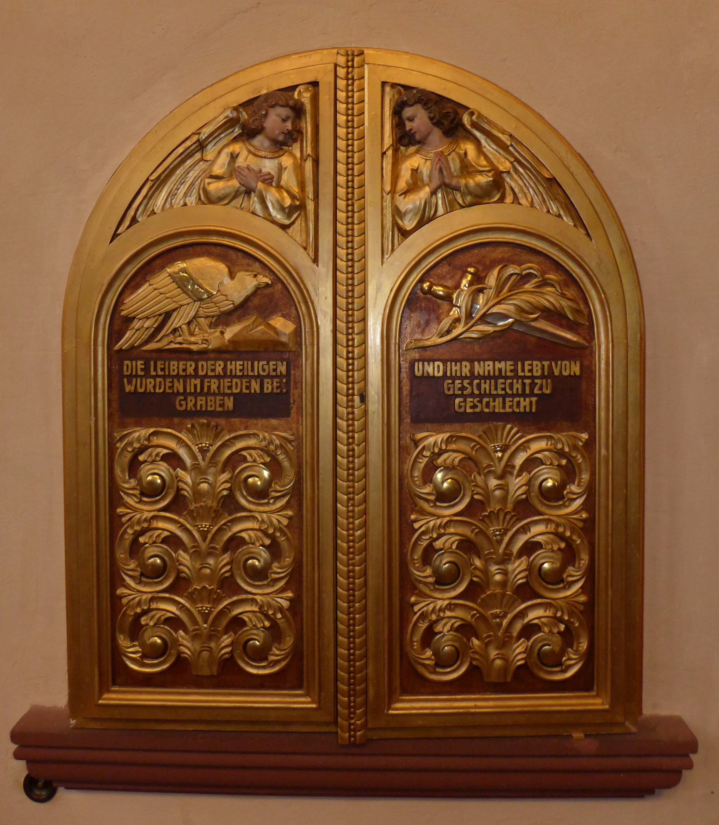 St. Luitwin (Mettlach), Geschlossene Nische der Staurothek